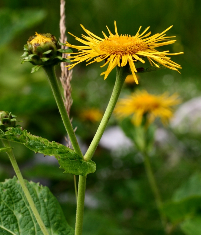 Inula_helenium (Enula campana) Località : "Giardino Botanico delle Alpi Orientali", Monte Faverghera (BL), 1500 m s.l.m.